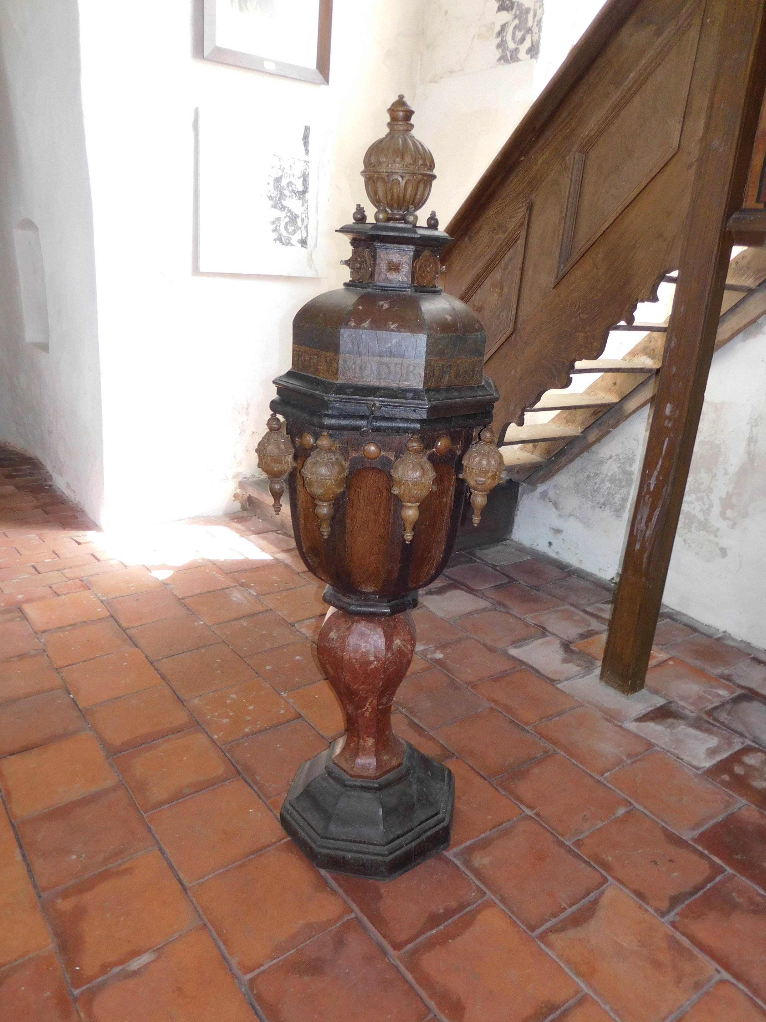 Taufbecken der evangelisch-lutherischen Kirche Wüppels